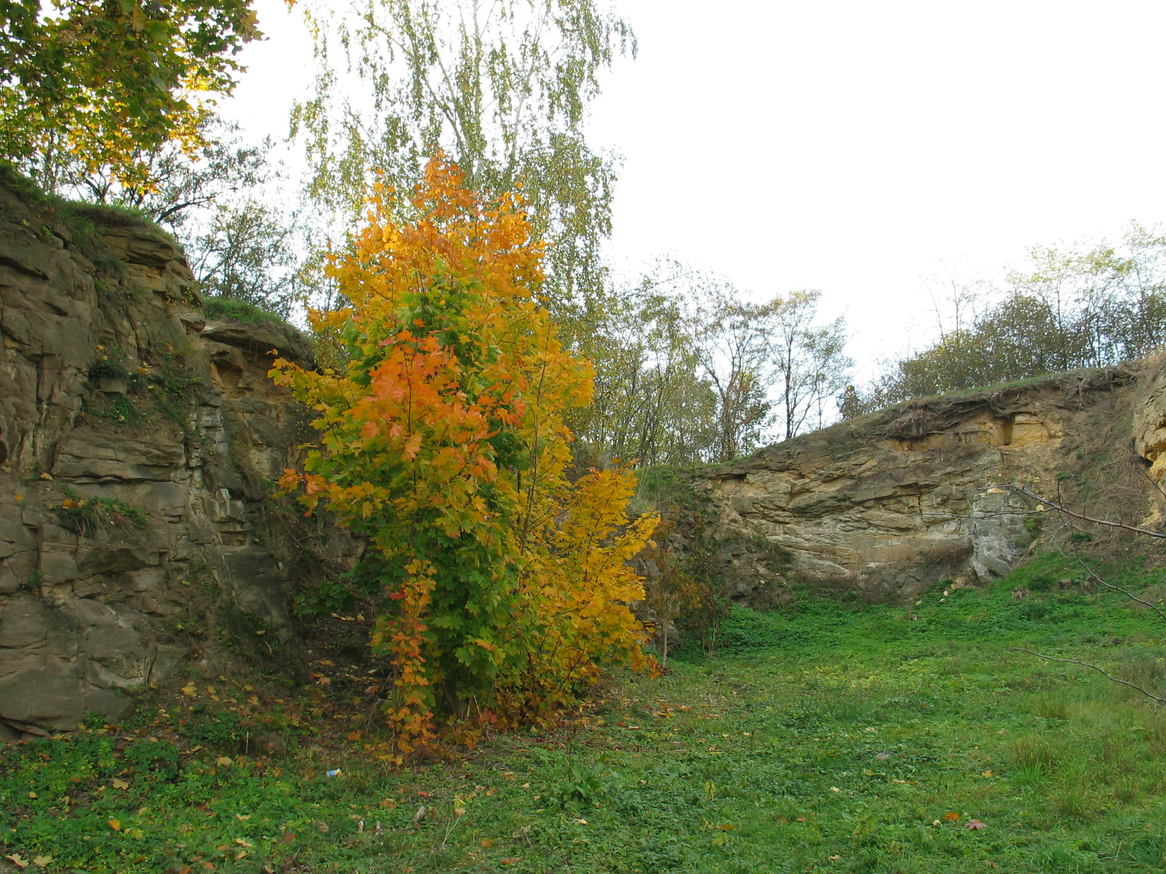 Česky: Praha-Horní Počernice, přírodní památka Chvalský lom, vnitřek lomu.